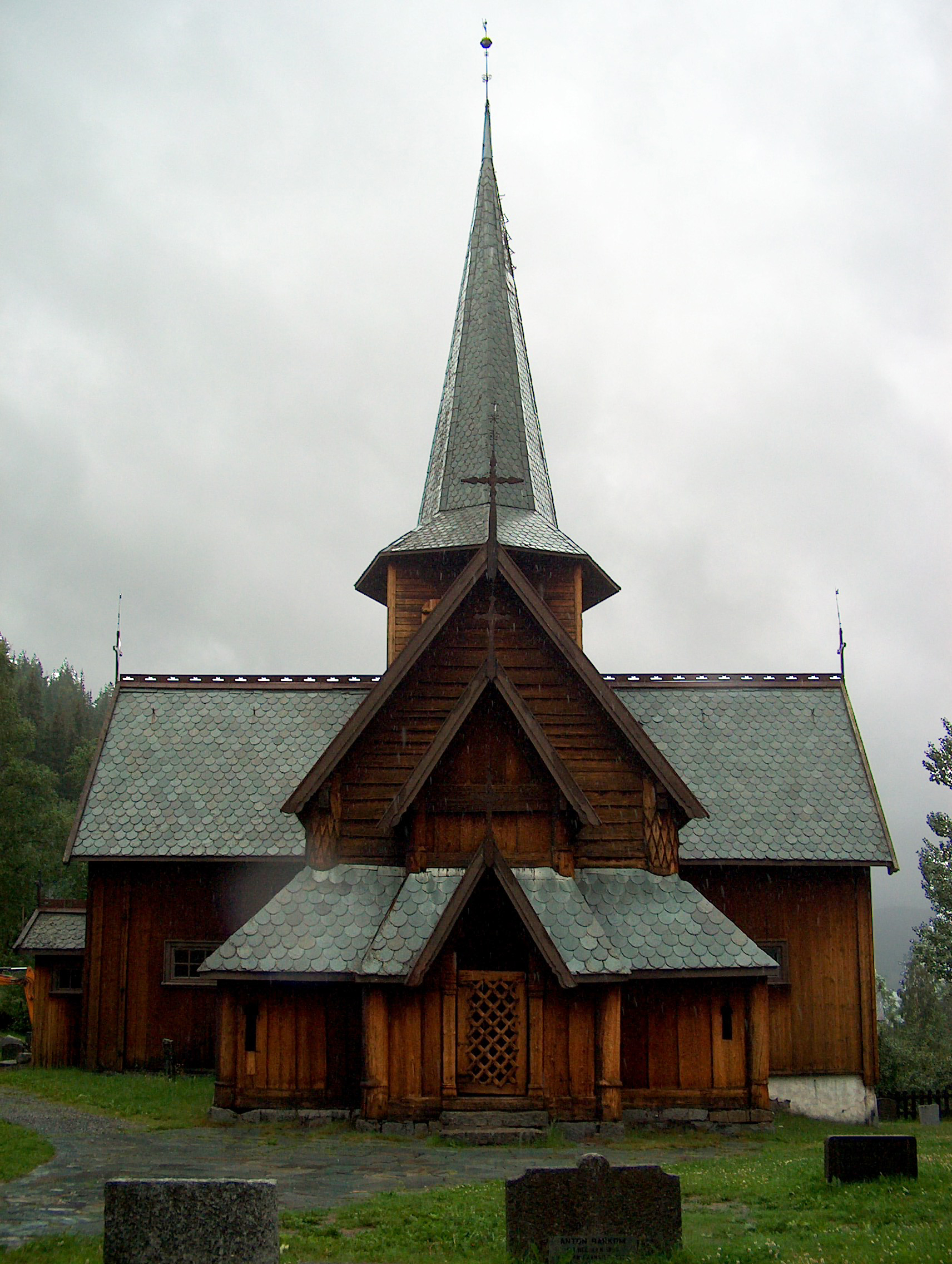 Hedalen stavkirke/Hedalen Stave Church